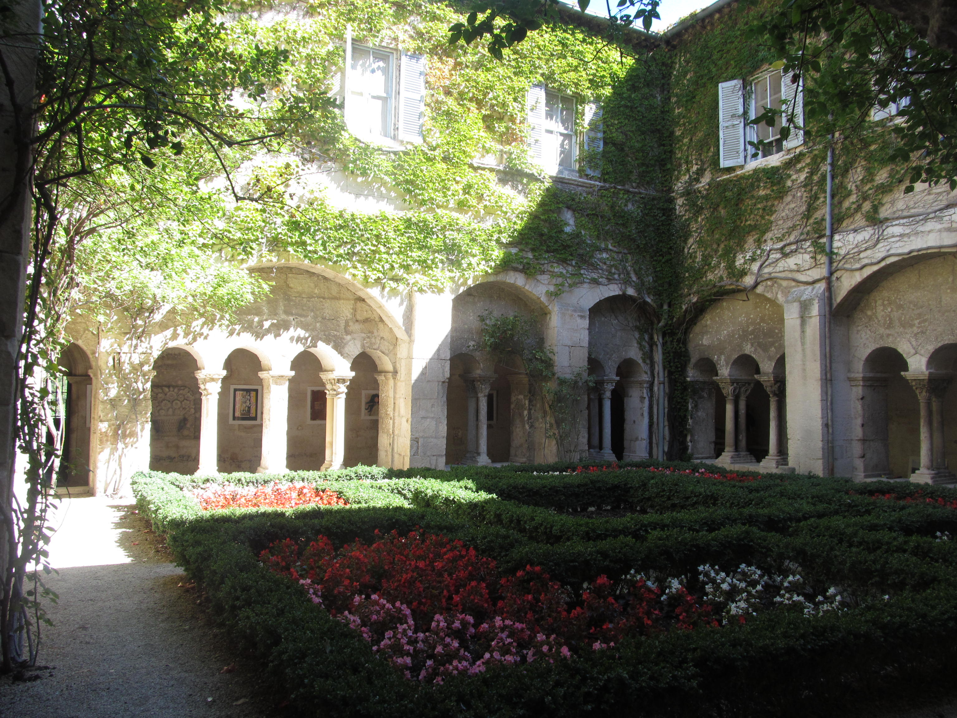 Klostergarten in Monastére Saint Paul-de-Mausole